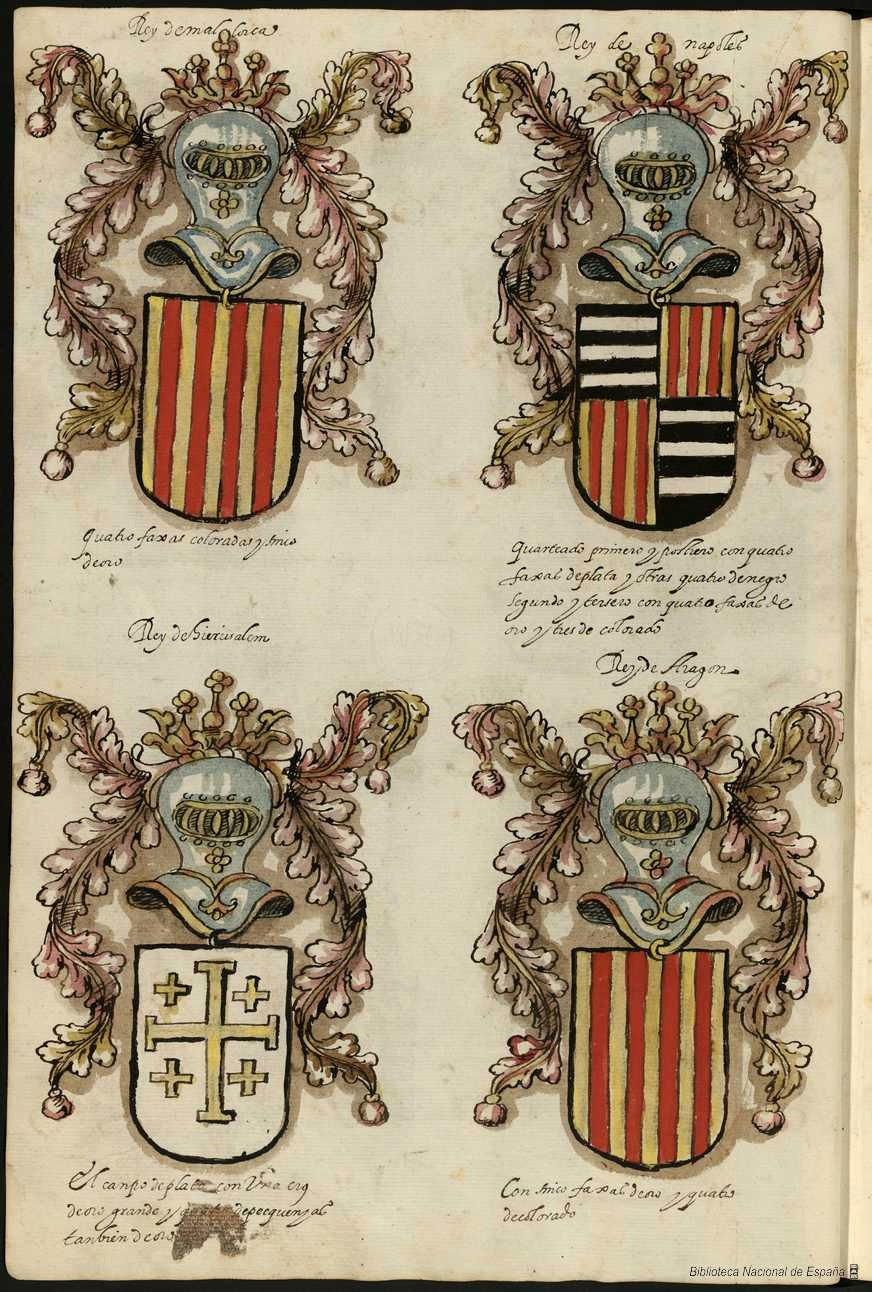 Libro de armas y blasones de diversos linajes y retratos (Armorial español del siglo XVI)